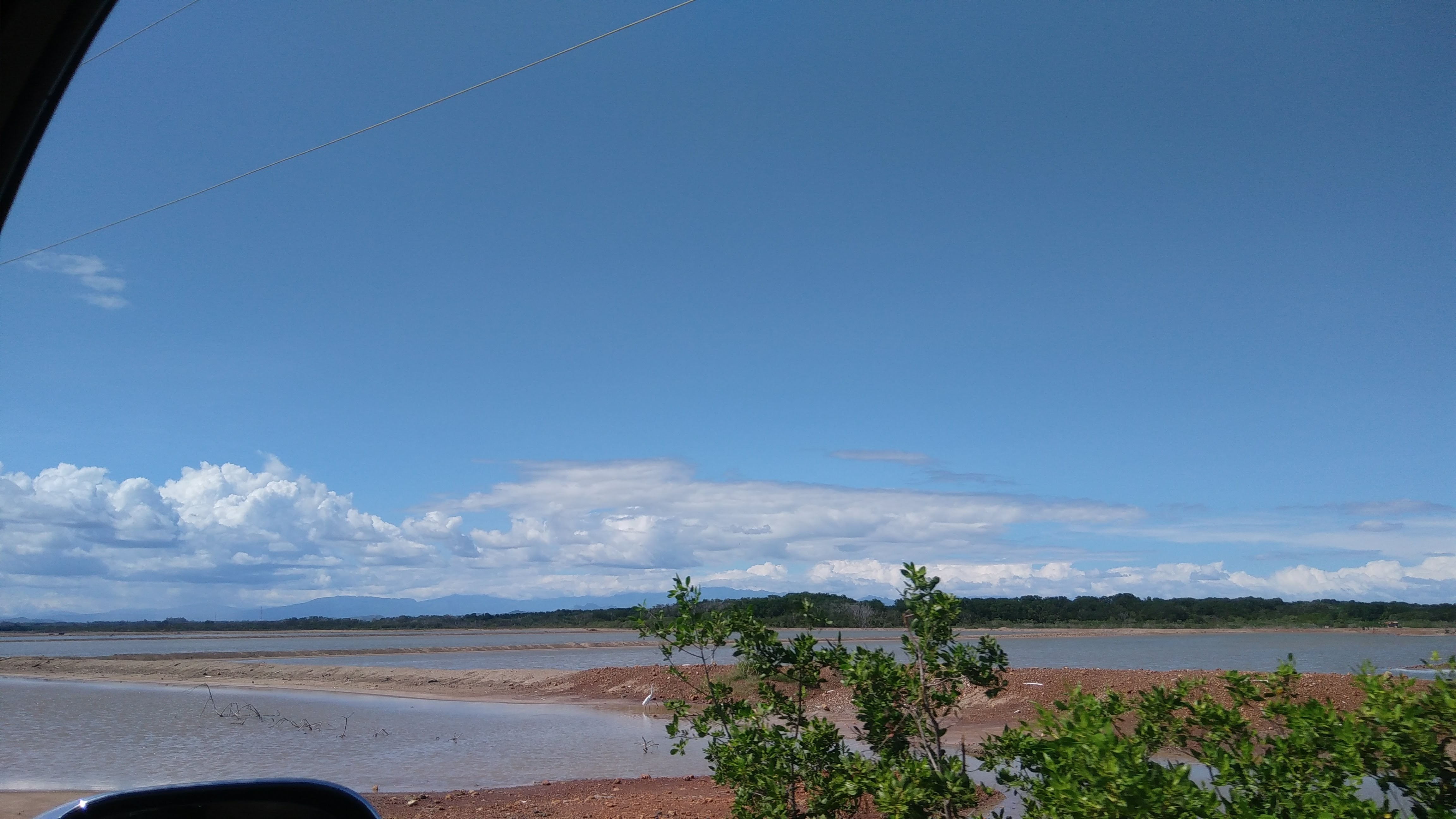 El Salao